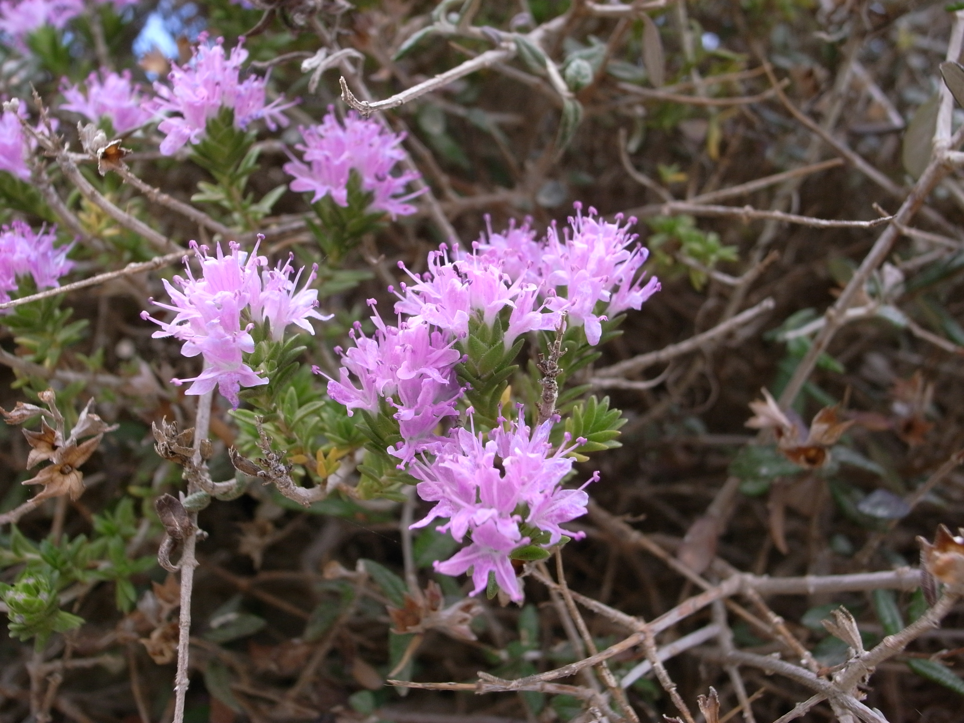 Thymbra capitata, Ghajn Tuffieha, Malta Inflorescence